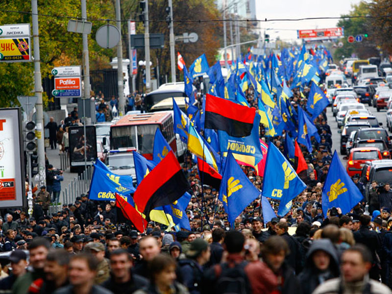 Марш УПА, Київ, 2009-10-14.